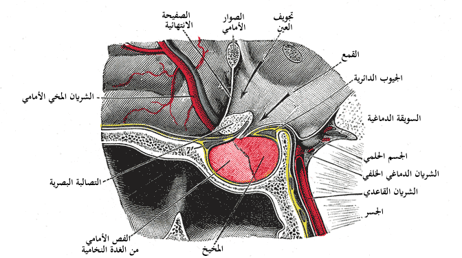 رسمٌ تشريحيّ للدماغ.